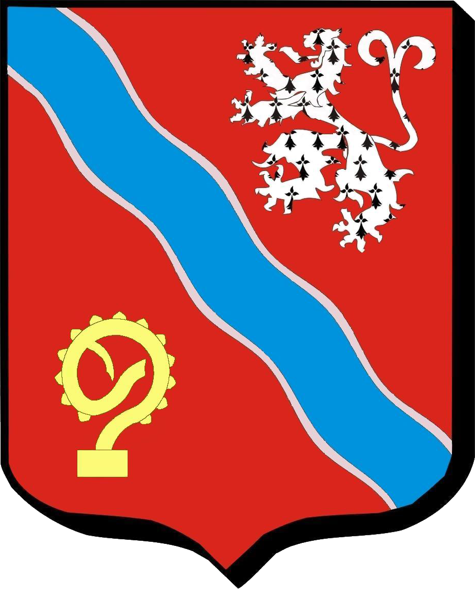 Blason de la commune de Cormoranche-Sur-Saône